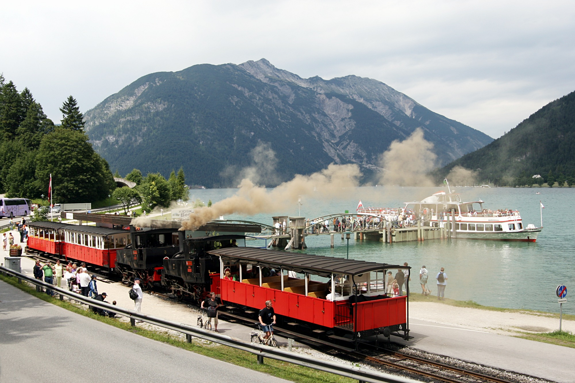 de: Bahnhof Seespitz der Achenseebahn mit zwei Zügen der Zahnradbahn und einem Ausflugsboot auf dem See en: Seespitz station on lake Achensee in Tyrol with two trains of the Achenseebahn cog railway and an excursion ship fr: Gare de Seespitz au bord du lac Achensee au Tyrol avec deux trains à crémaillère du chemin de fer à crémaillère de l'Achenseebahn et un bateau de croisière